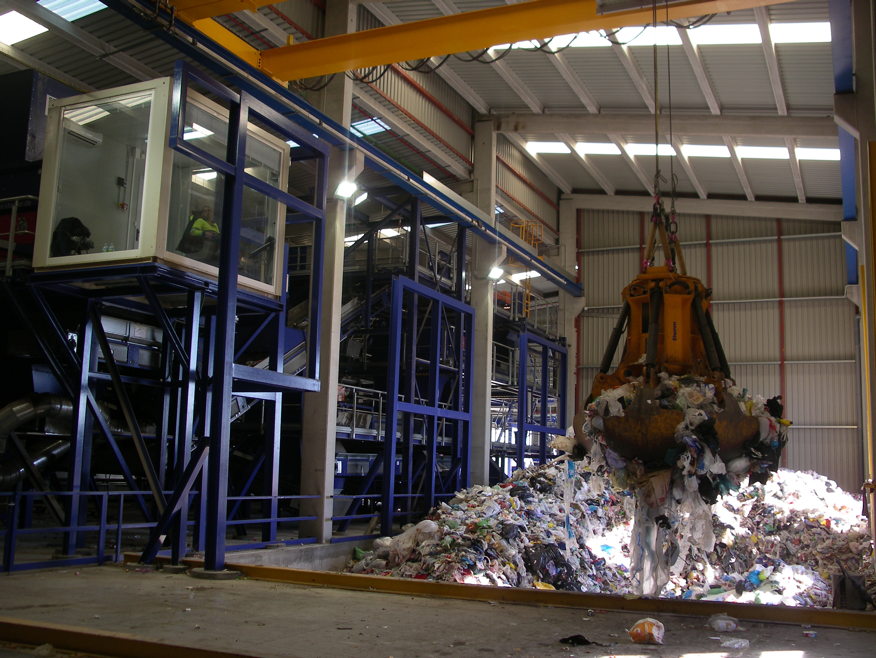 Foso de recepción de una planta de selección de RSU